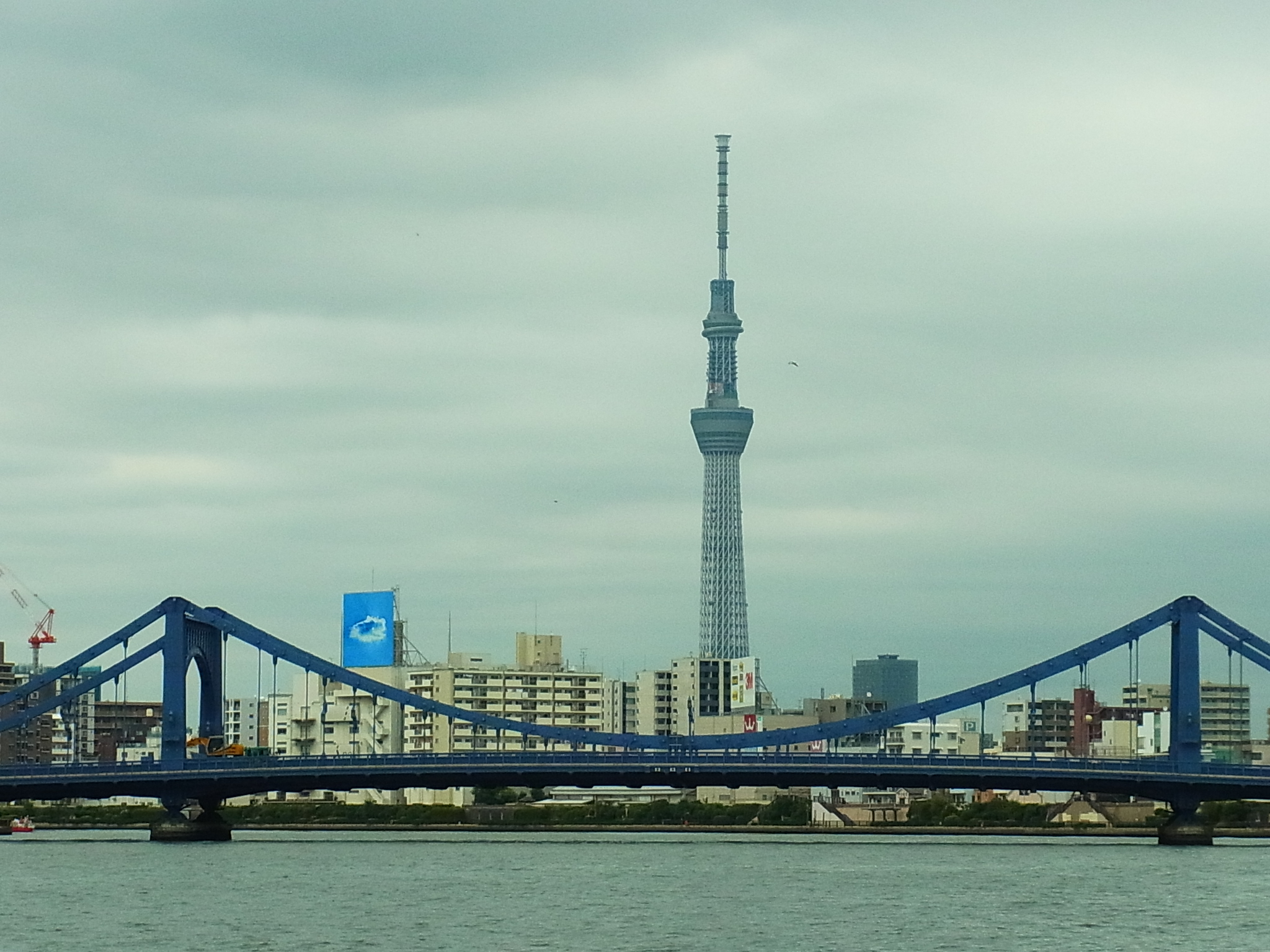 隅田川に架かる清洲橋